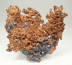 Cobre es el elemento químico de número atómico 29.